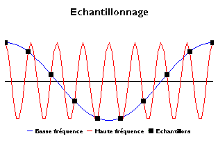 Exemple echantillonnage de deux signaux. Image personnelle (inspirée de Domaine public